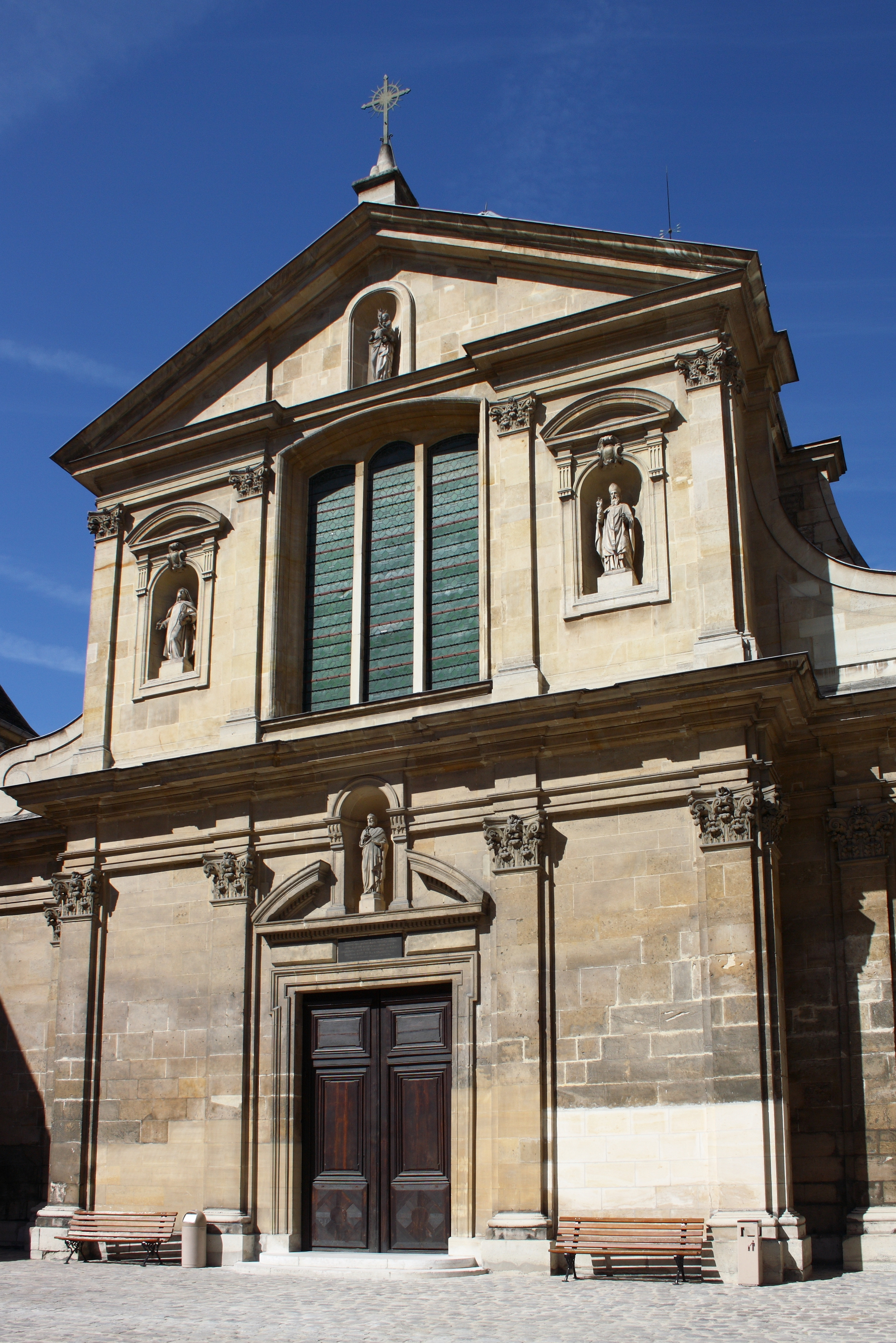 Katholische Kirche Saint-Joseph-des Carmes, ehemalige Kirche der Unbeschuhten Karmeliten, 70, rue de Vaugirard im 6. Arrondissement in Paris Object location48° 50′ 54.31″ N, 2° 19′ 45.8″ E